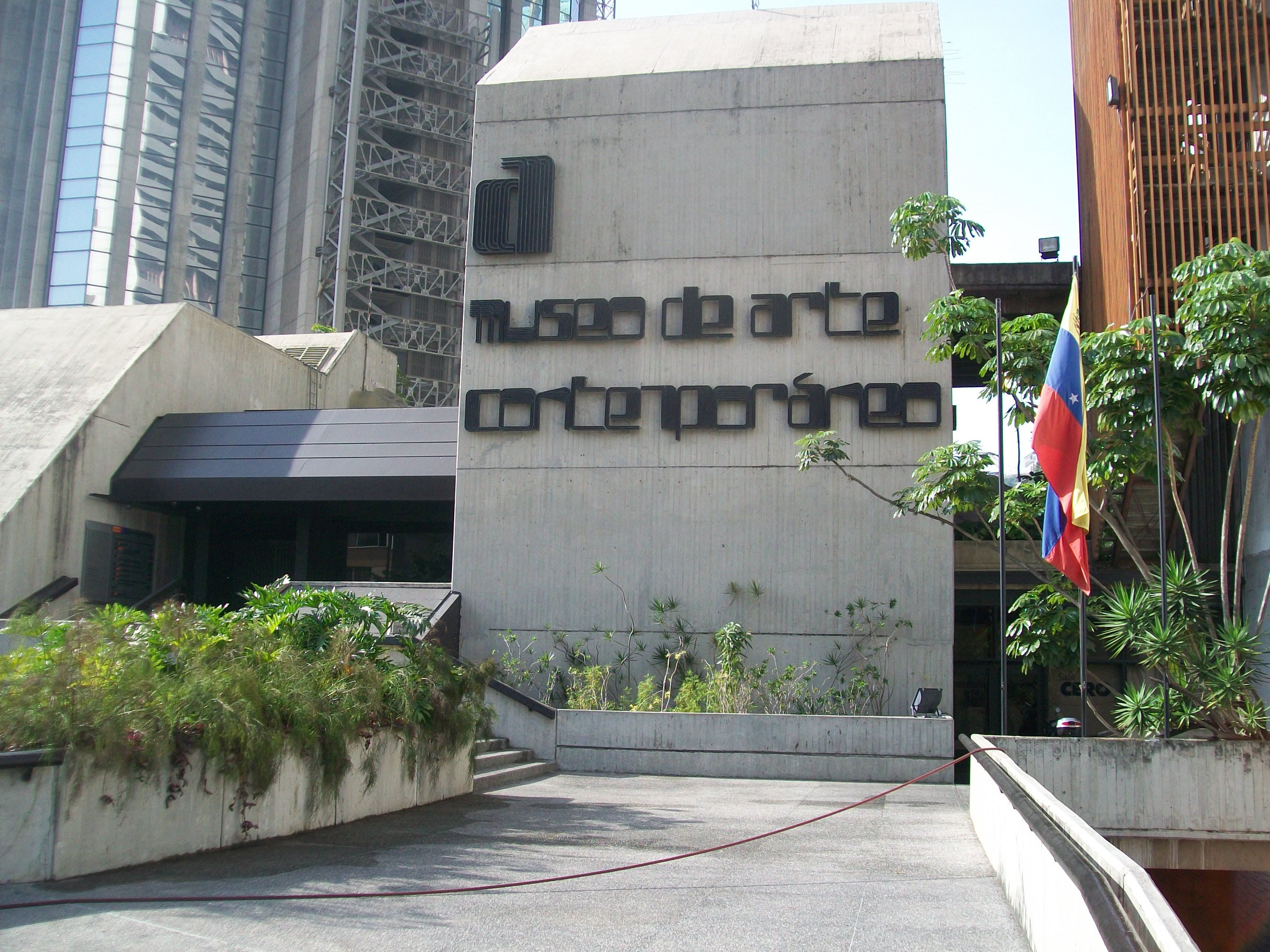 Fachada principal del Museo de Arte Contemporáneo de Caracas, Venezuela.